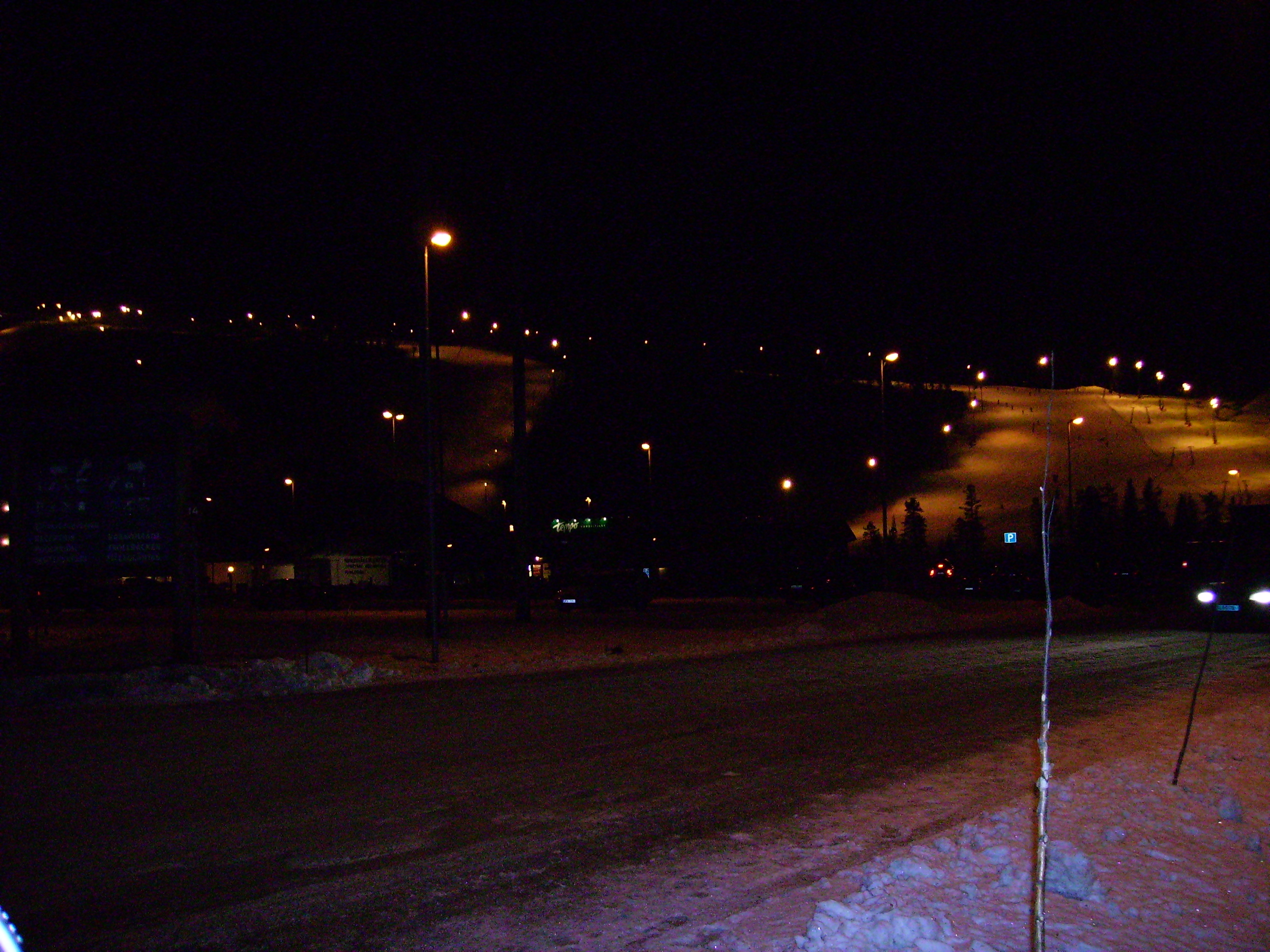 Hundfjället, Sälen by night